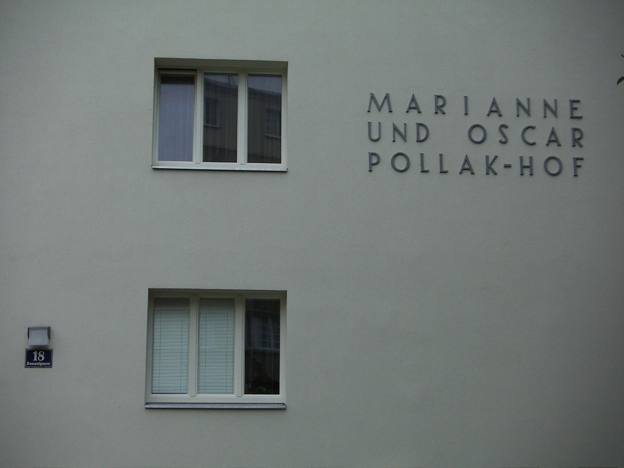 Wohnhausanlage Marianne-und-Oscar-Pollak-Hof in Floridsdorf, Dunantgasse 18